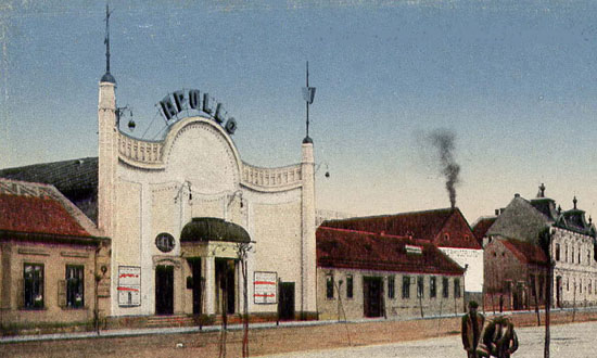 Pohľadnica kina Apollo v Lučenci z 20. rokov 20. storočia. Kino bolo postavené v roku 1910.